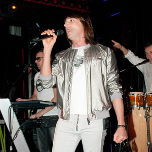 Николай Тимофеев на презентации клипа «Нано-Техно» в ресторане «Ноа» 20 октября 2011 года